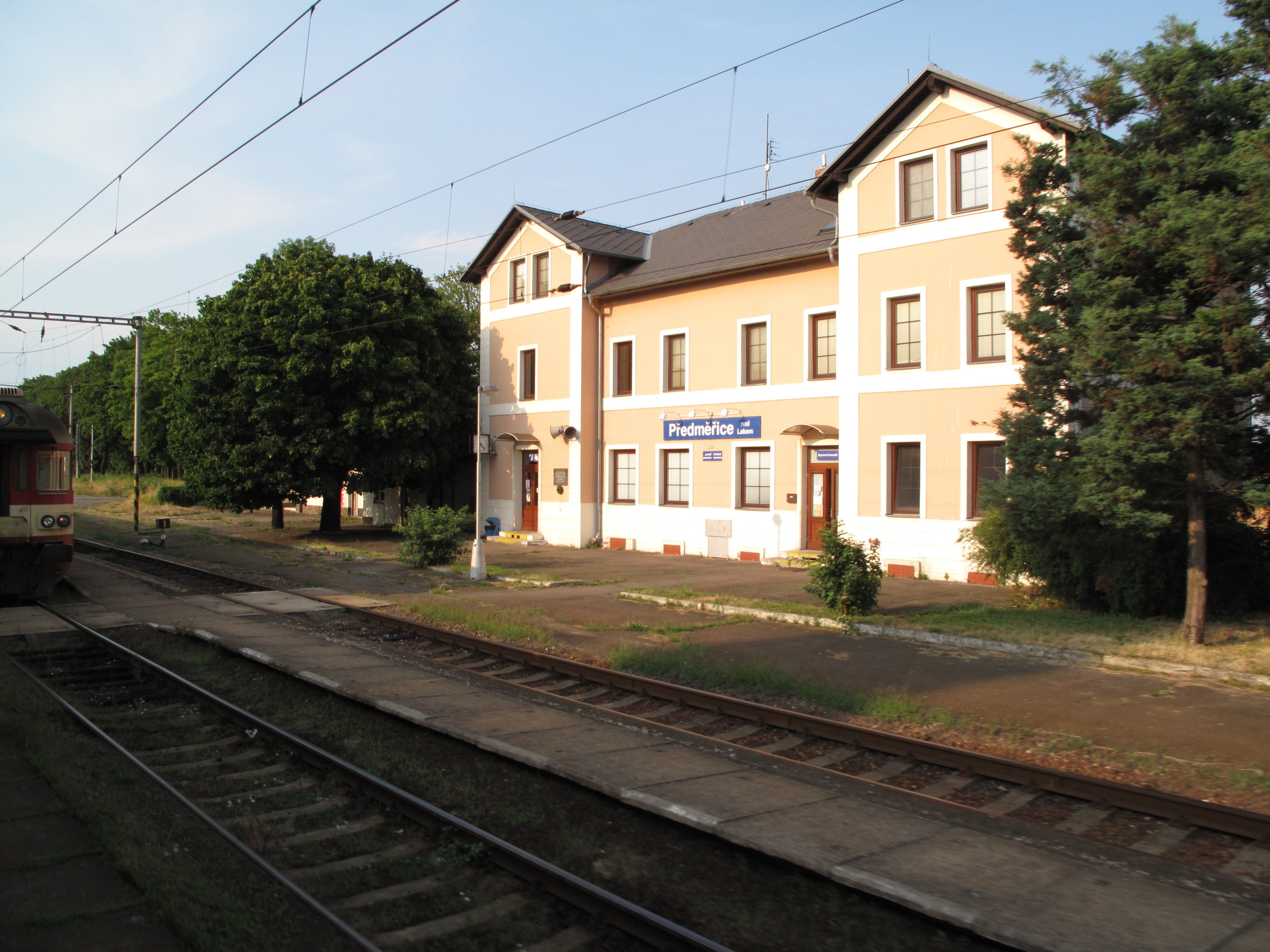 Předměřice nad Labem, železniční zastávka